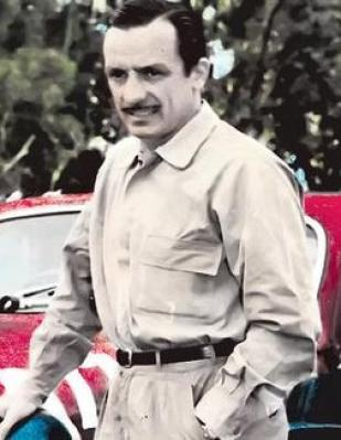 Juan Gálvez, nueve veces campeón argentino de Turismo Carretera, junto a su Ford V8.